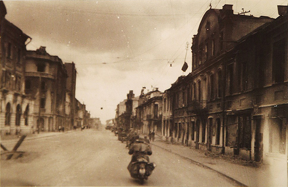 Беларуская (тарашкевіца): Менск (Miensk), вуліца Захараўская (vulica Zacharaŭskaja) каля скрыжаваньня з завулкам Захараўскім (zavułak Zacharaŭski)